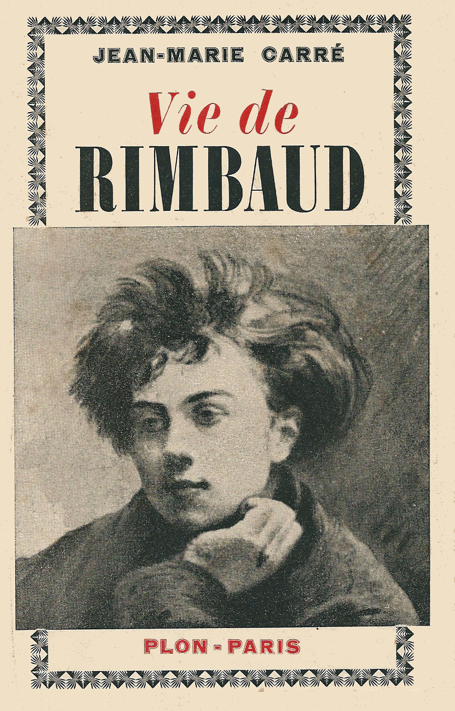 Couverture de Jean-Marie Carré, la Vie de Rimbaud , Plon à Paris, 1926, édition 1939